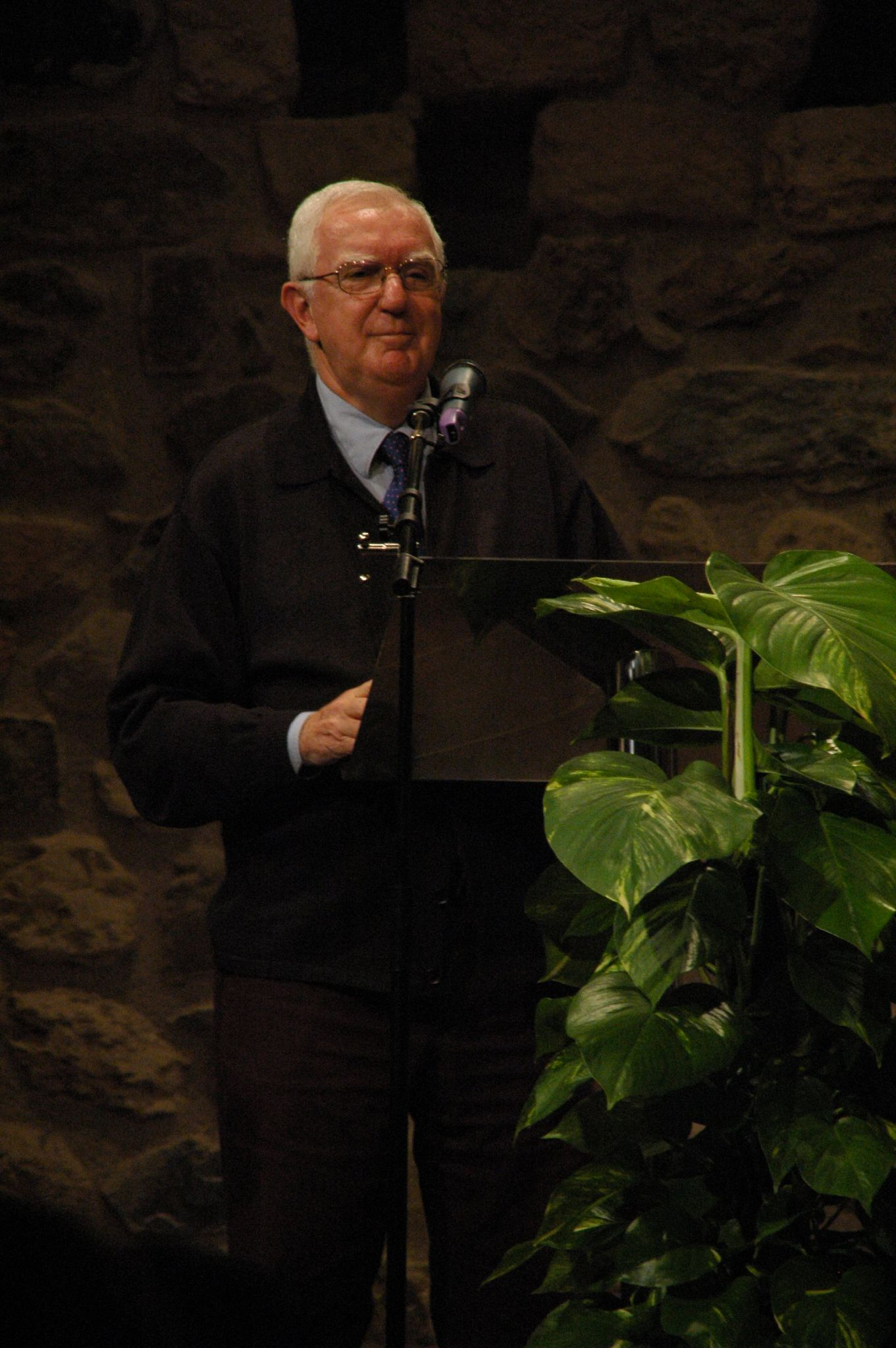 El discurs